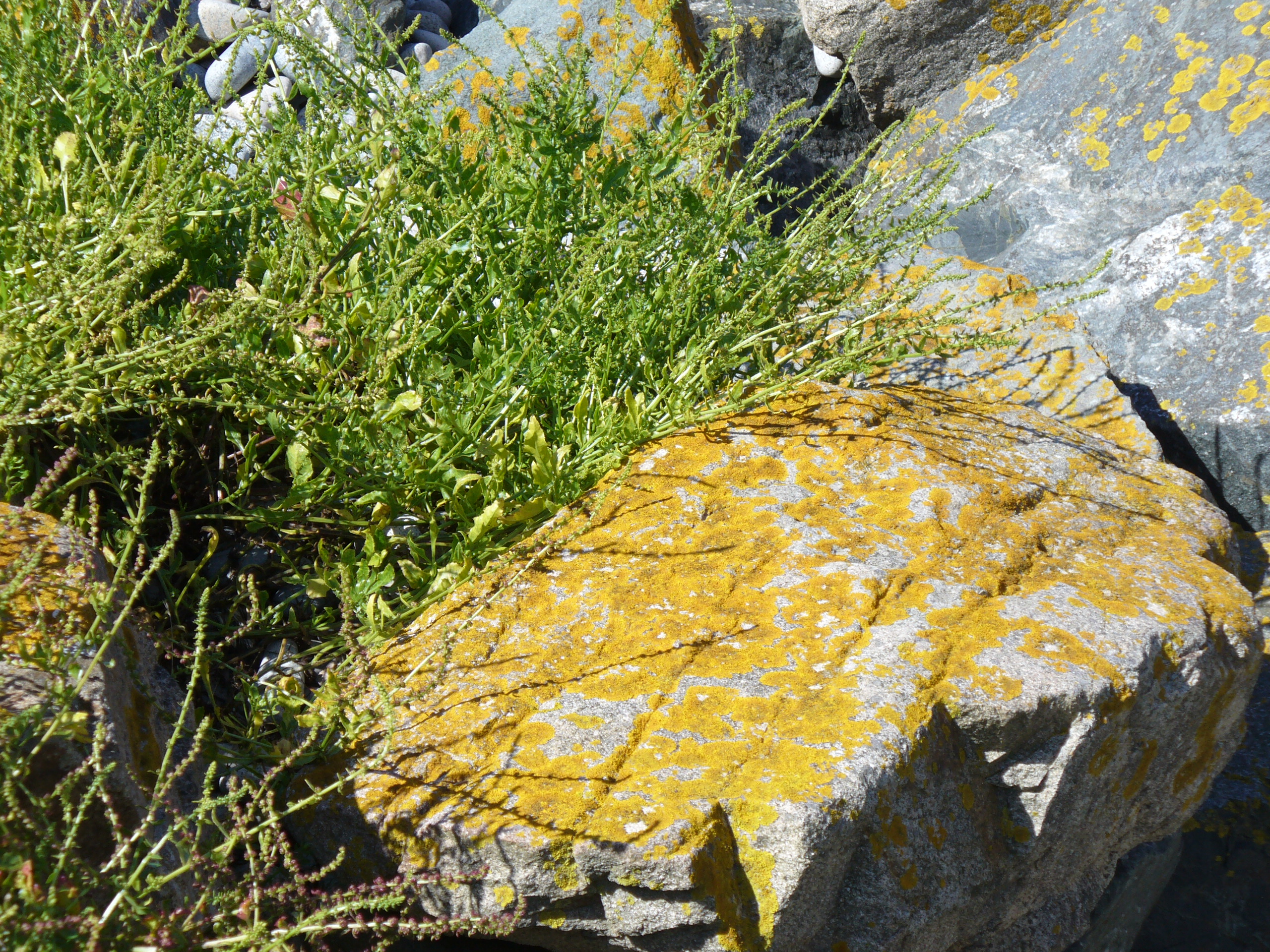 Das Felsenmeer rings um das Pointe du Château - Côte de Granit Rose (Côte de granit rose) - Rosa Granitküste - Commune Plougrescant, Departement Côtes-d'Armor, Region Bretagne - Spaziergang - Steffen Heilfort